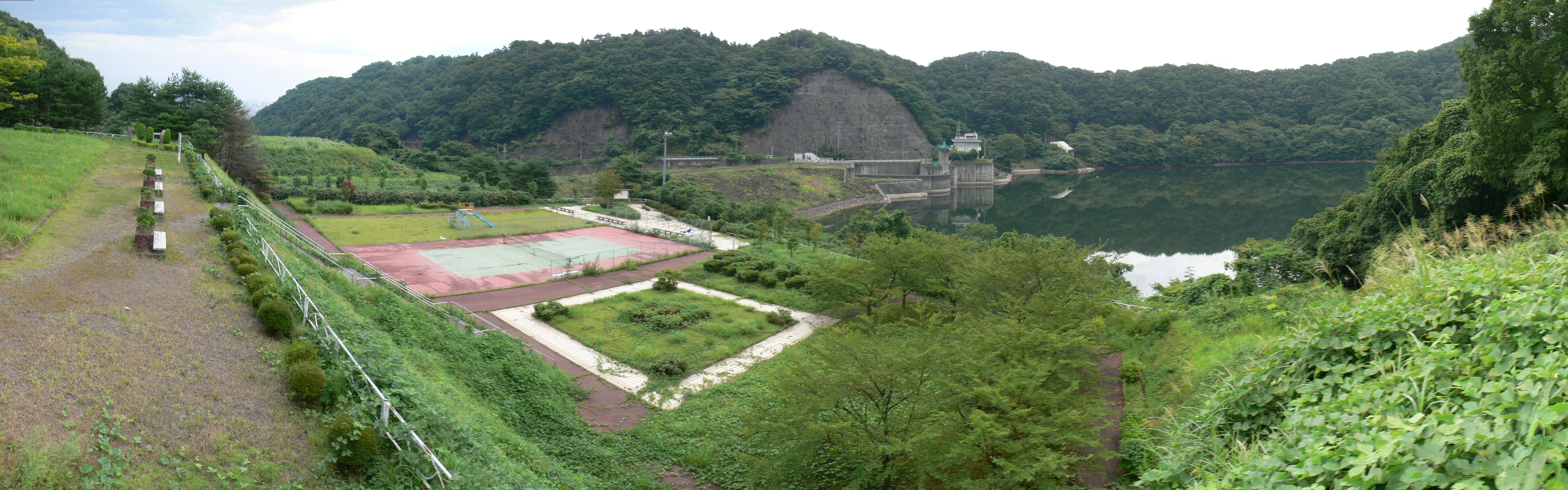 樽水ダム公園